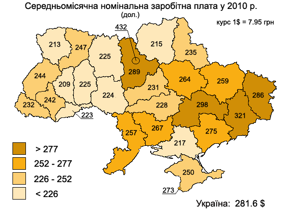 Середня заробітна плата у регіонах України у 2010 р., дол. США